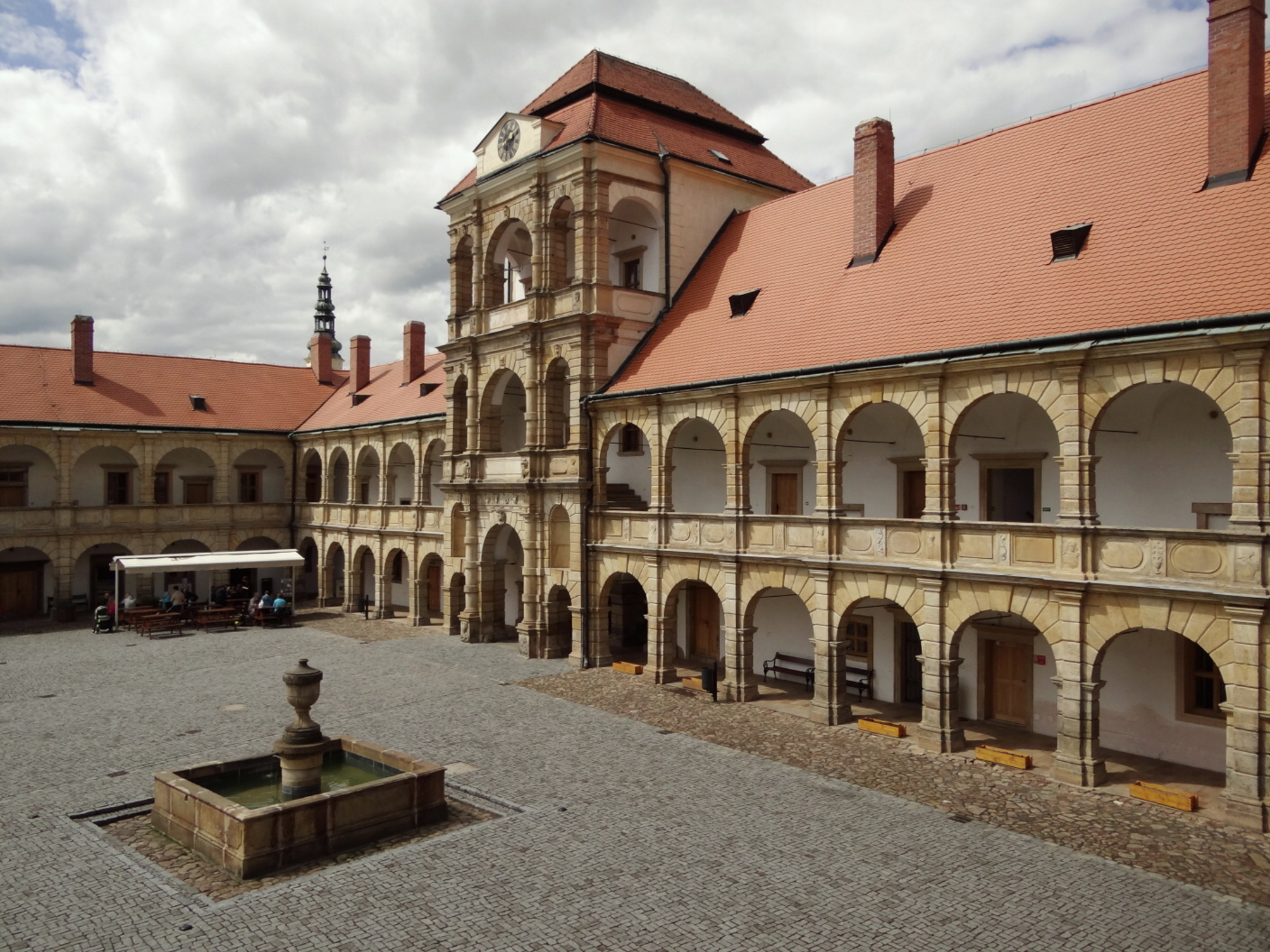 Nádvoří renesančního zámku s křídly se dvěma úrovněmi arkád v Moravské Třebové.